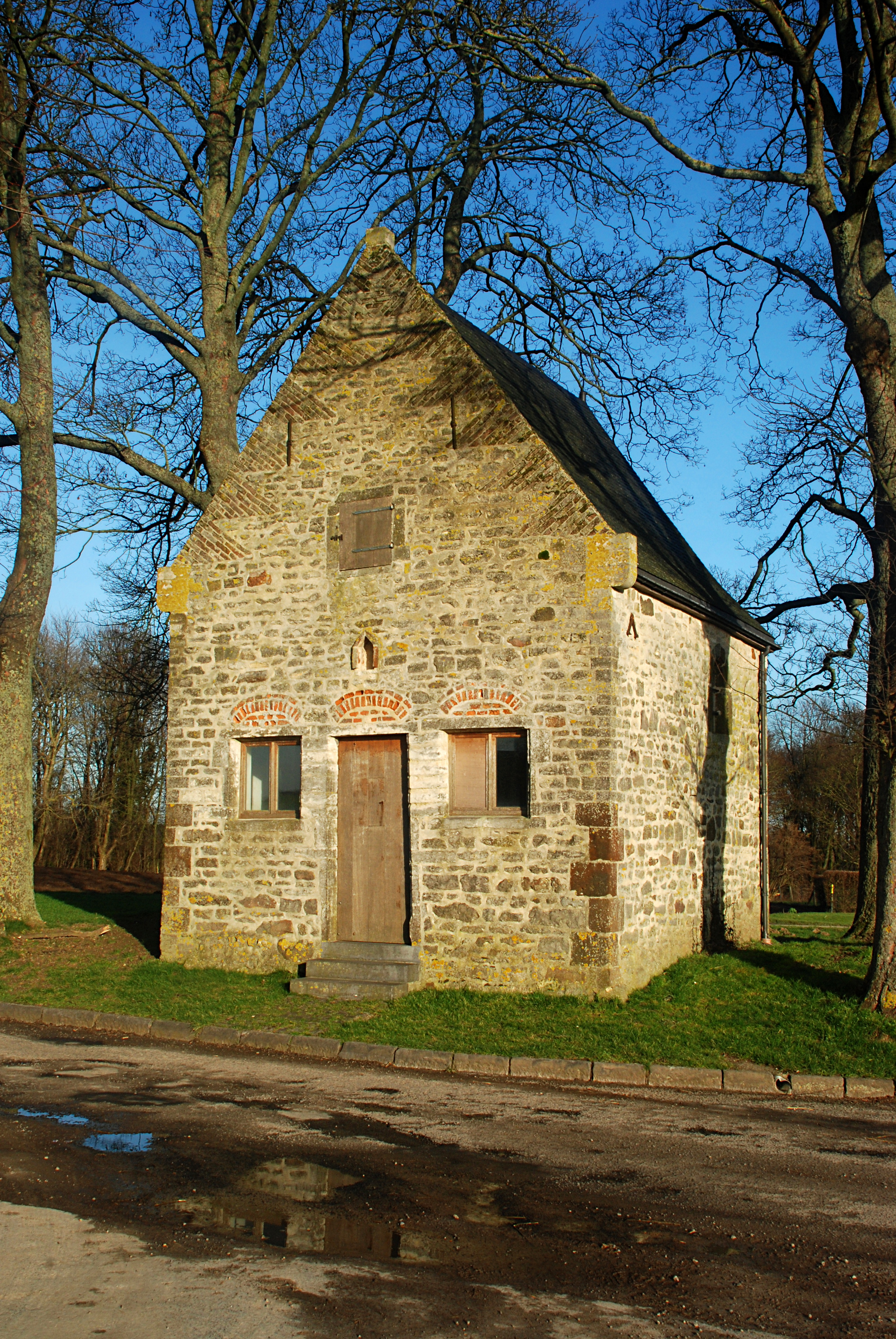 Belgique - Brabant wallon - Chaumont-Gistoux - Longueville - Chapelle du Chêneau